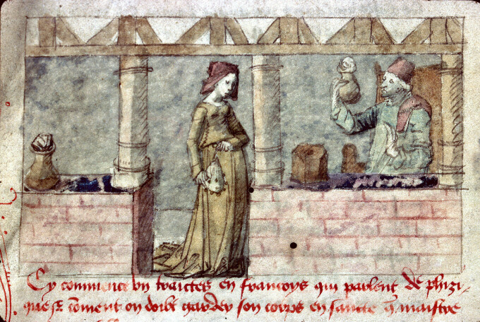 Le régime du corps. Besançon - BM - ms. 0463 (f. 001)